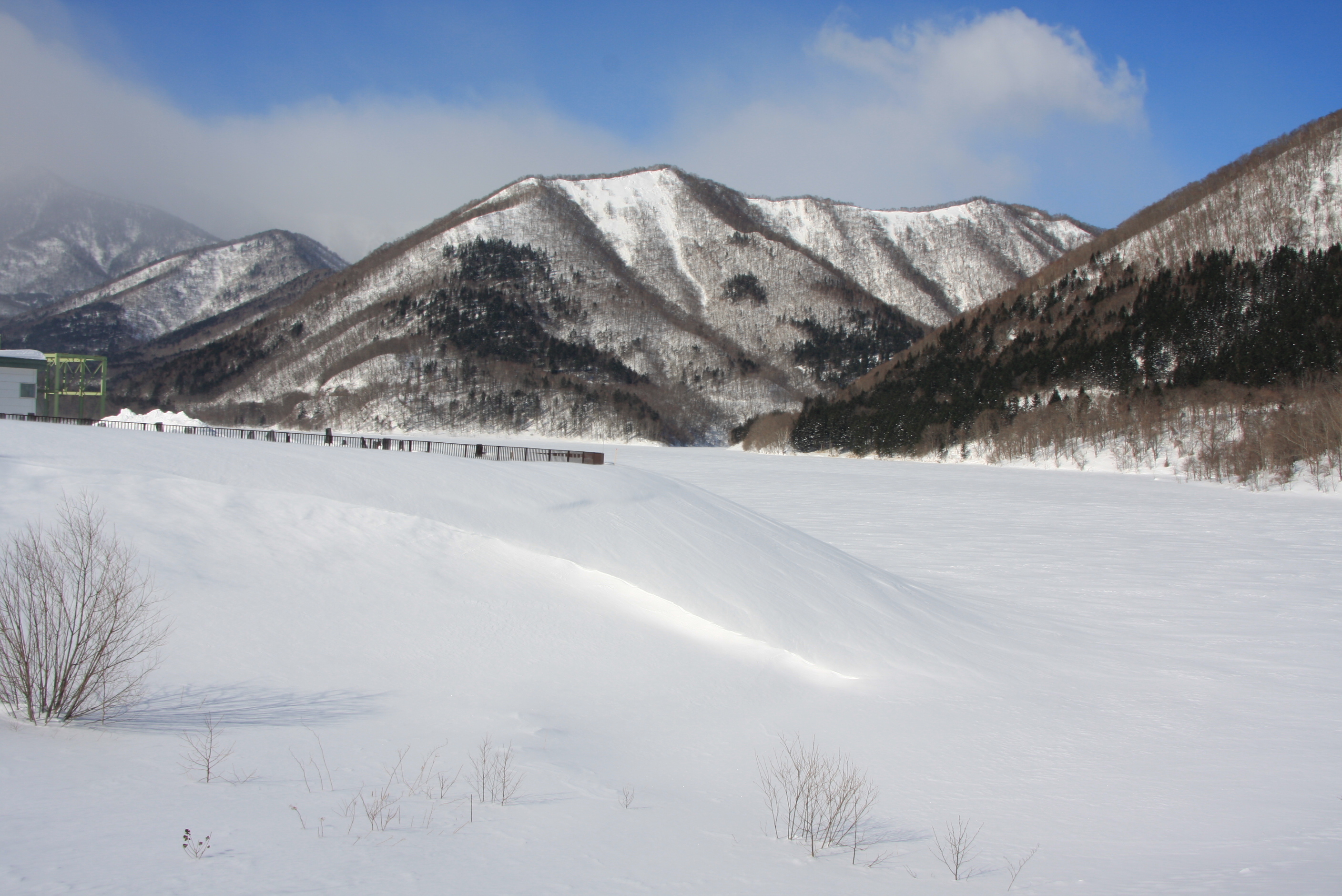 日高山脈 美生ダム湖